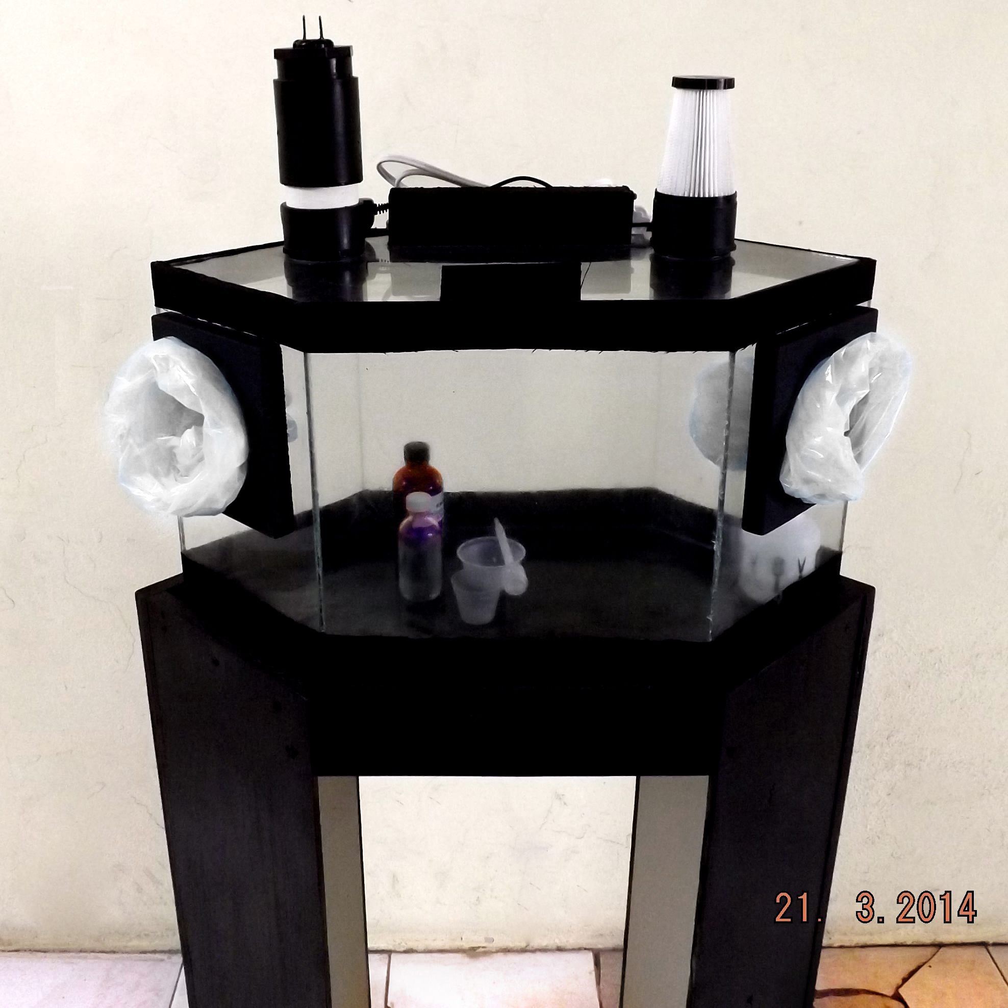 A self-made glovebox with HEPA-11 filter and light as an example of what those orchid and/or growers use (in many different versions) for the handling of seeds/spores and substrates